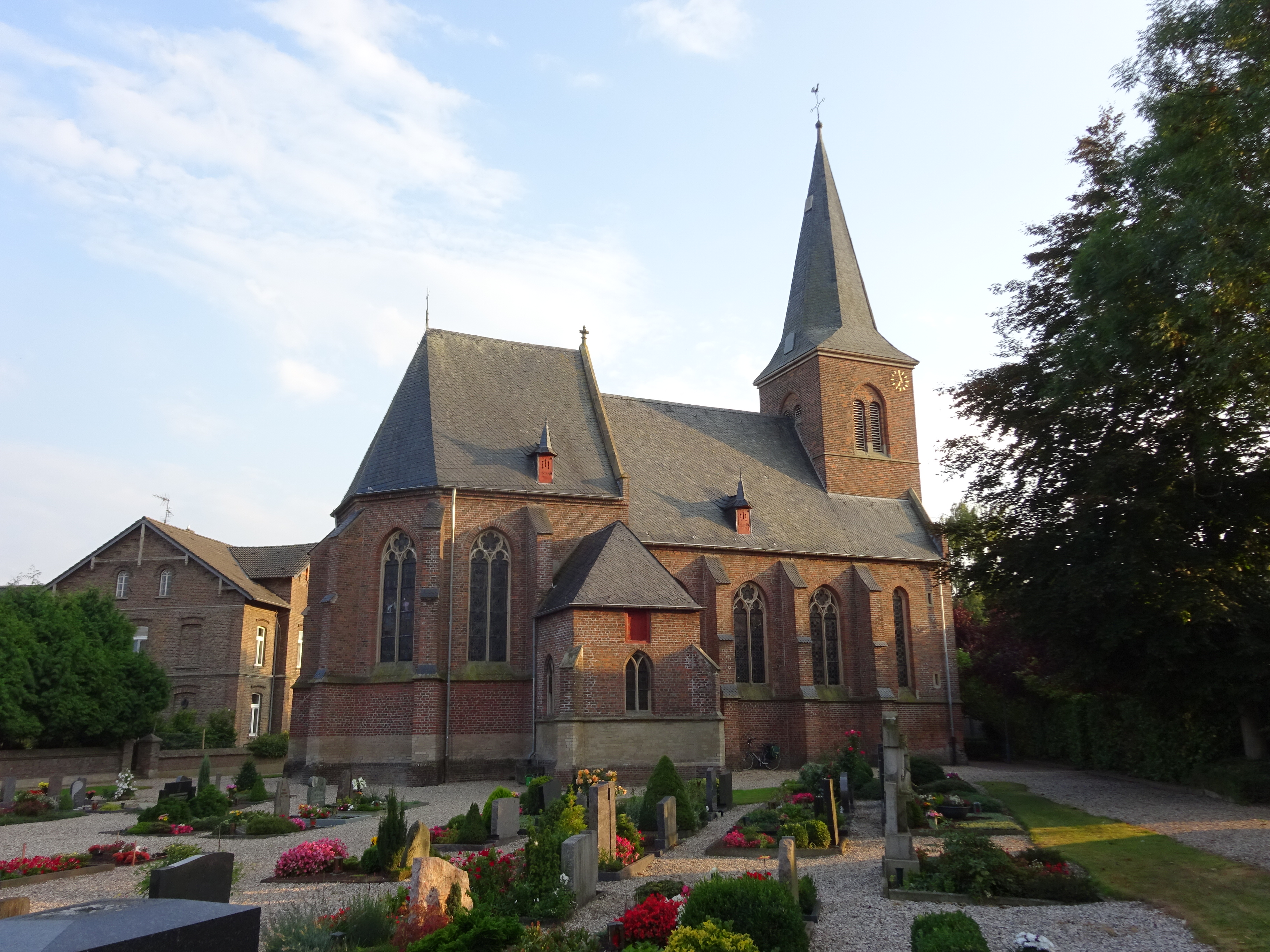 Bedburg-Hau-Huisberden, St. Petrus